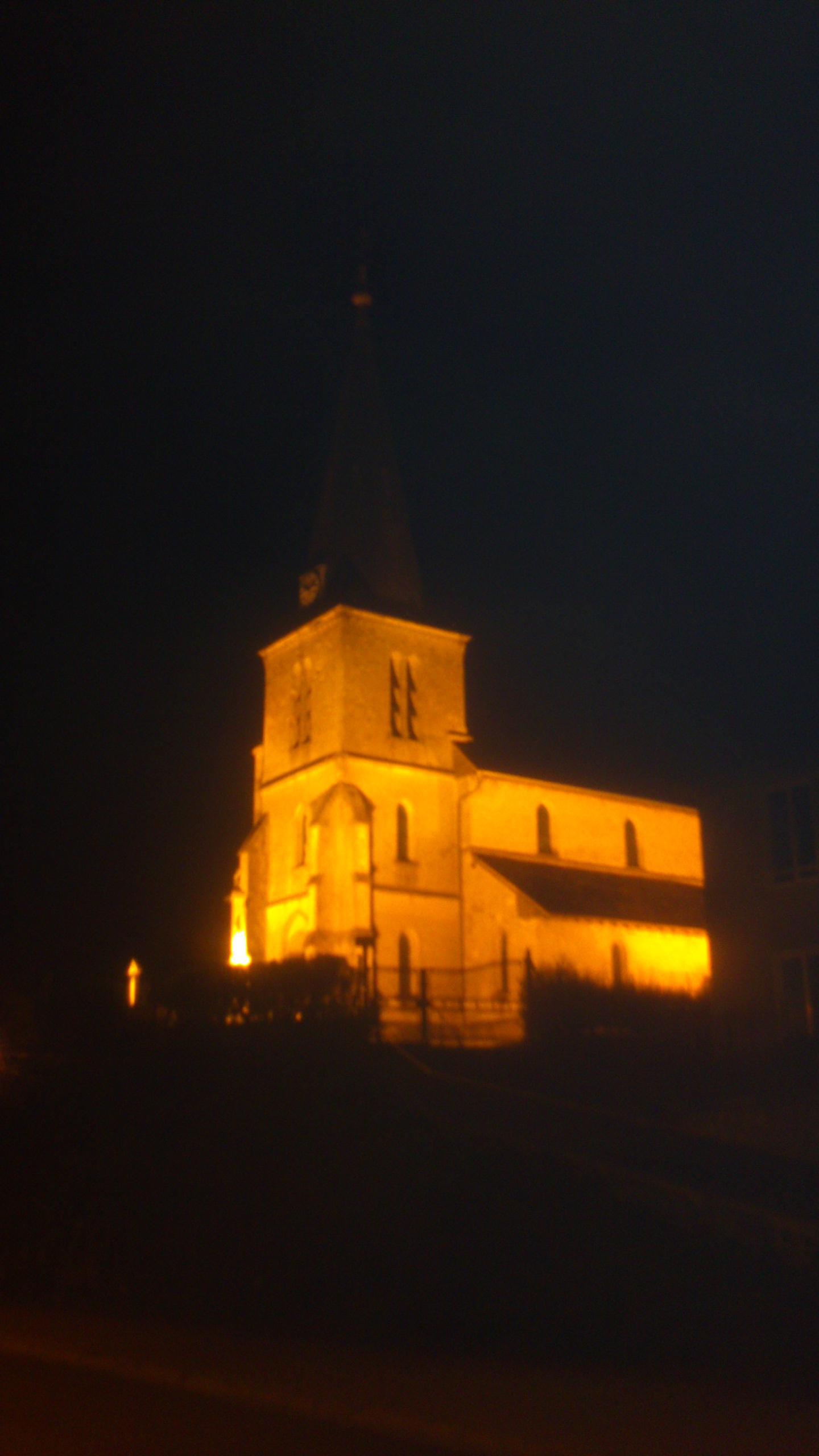 Église de la Nativité-de-la-Sainte-Vierge de Chatel-Raould .